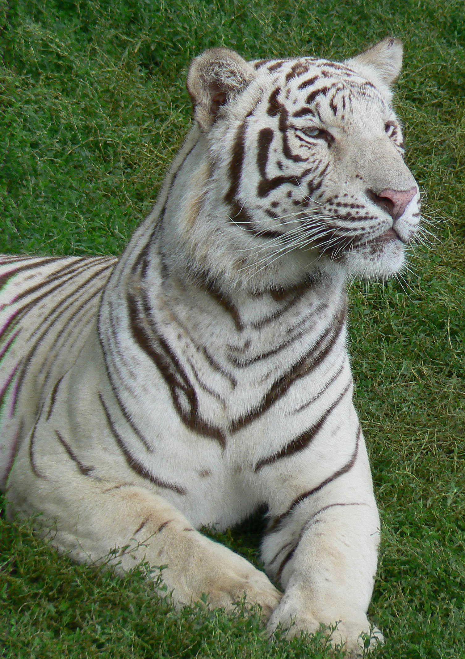 White tiger